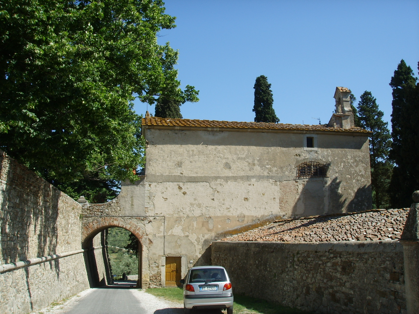 Oratorio della visitazione-Visitation oratory